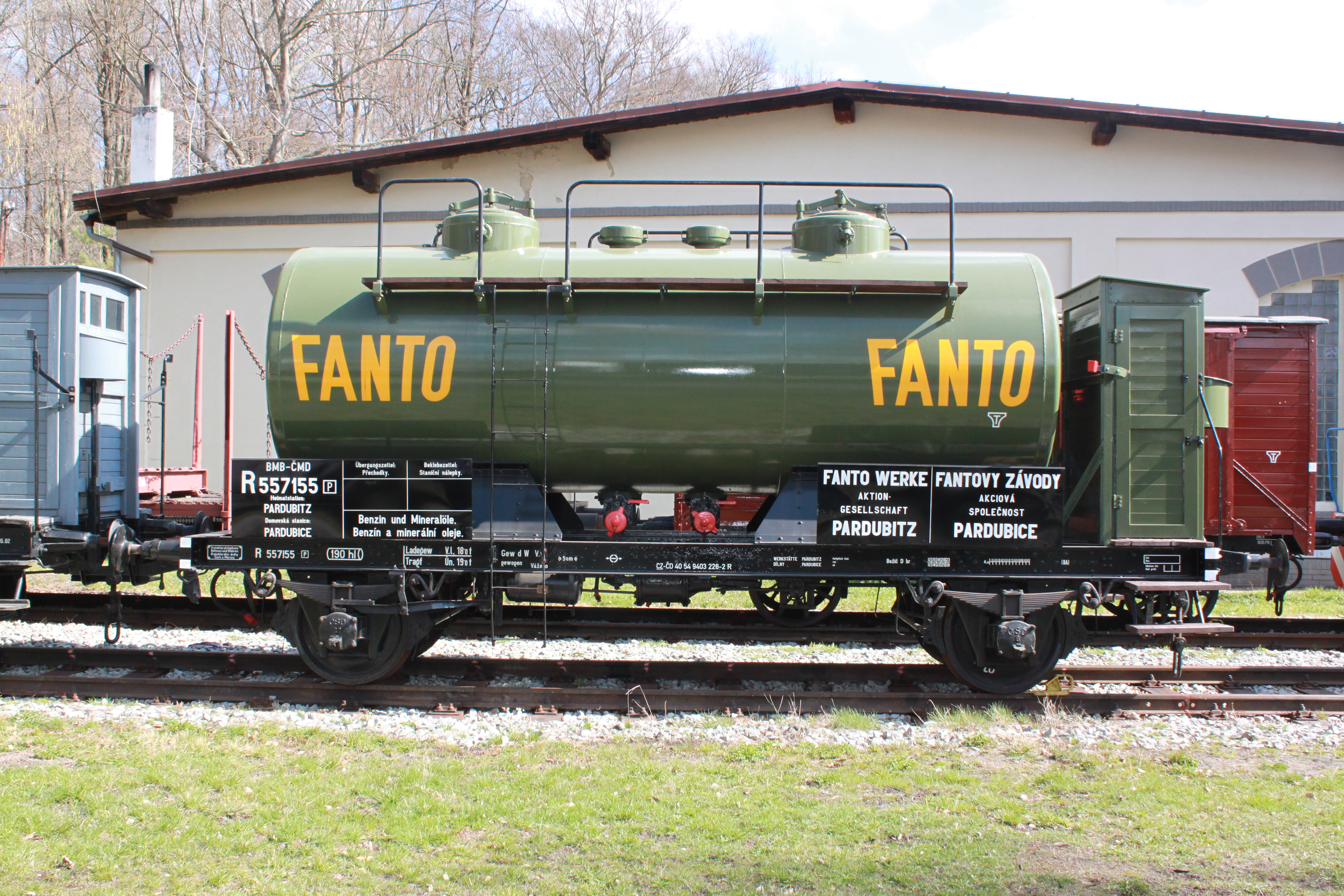 Kotlový vůz pardubické rafinerie Fanto v železničním muzeu v Lužné u Rakovníka